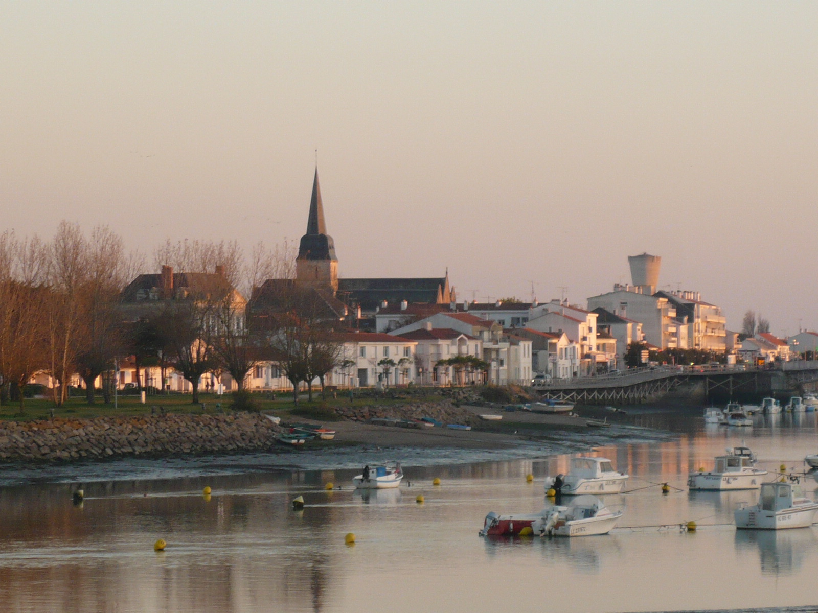 Saint-Gilles-Croix-de-Vie dans le département de la Vendée (France) : Vue sur la rive du fleuve côtier la Vie côté Saint-Gilles le long de la promenade Pierre Garcie-Ferrande en octobre 2008. Au centre en arrière-plan : l'église Saint-Gilles.